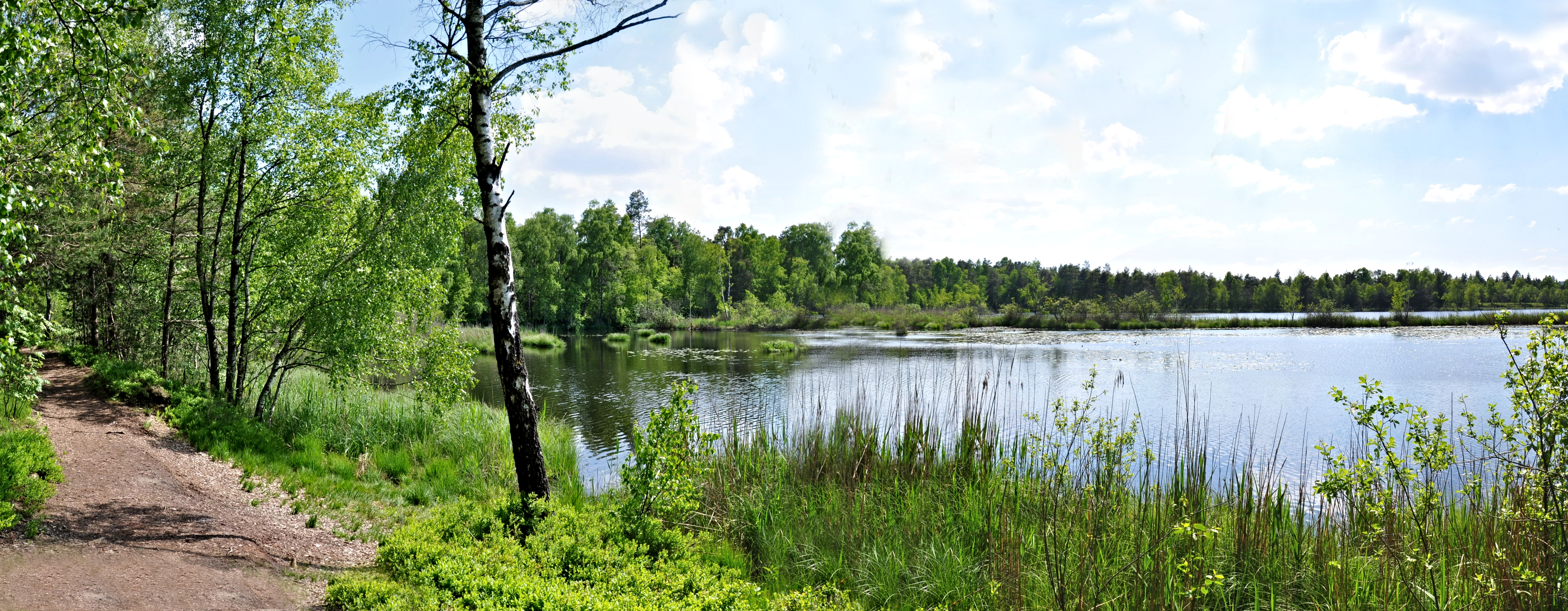 Naturschutzgebiet „Dornacher Ried mit Häckler Ried, Häckler Weiher und Buchsee“ bei Fronreute in Oberschwaben. Blick auf den Häckler Weiher mit Häcklerried.